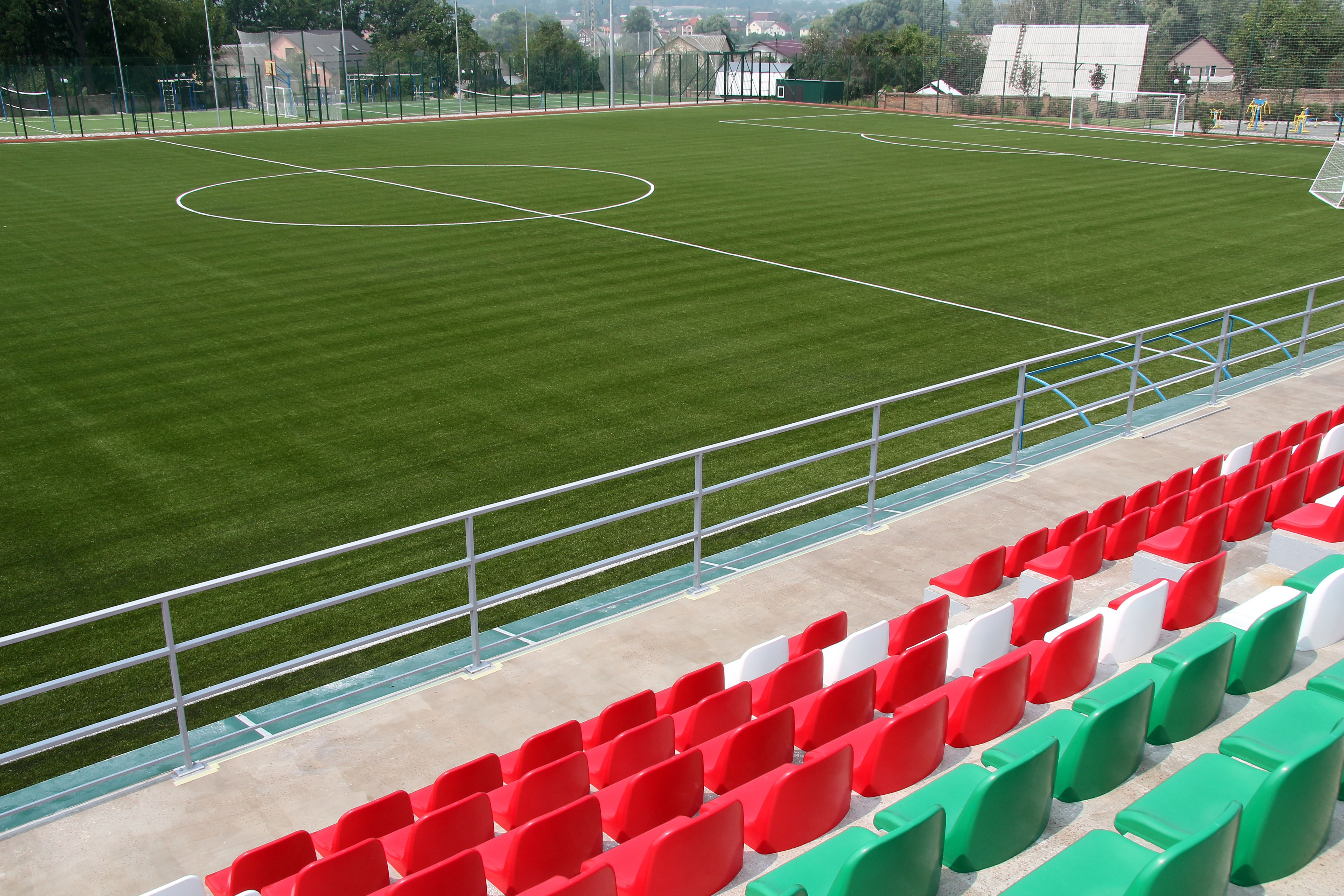 Ірпінський стадіон